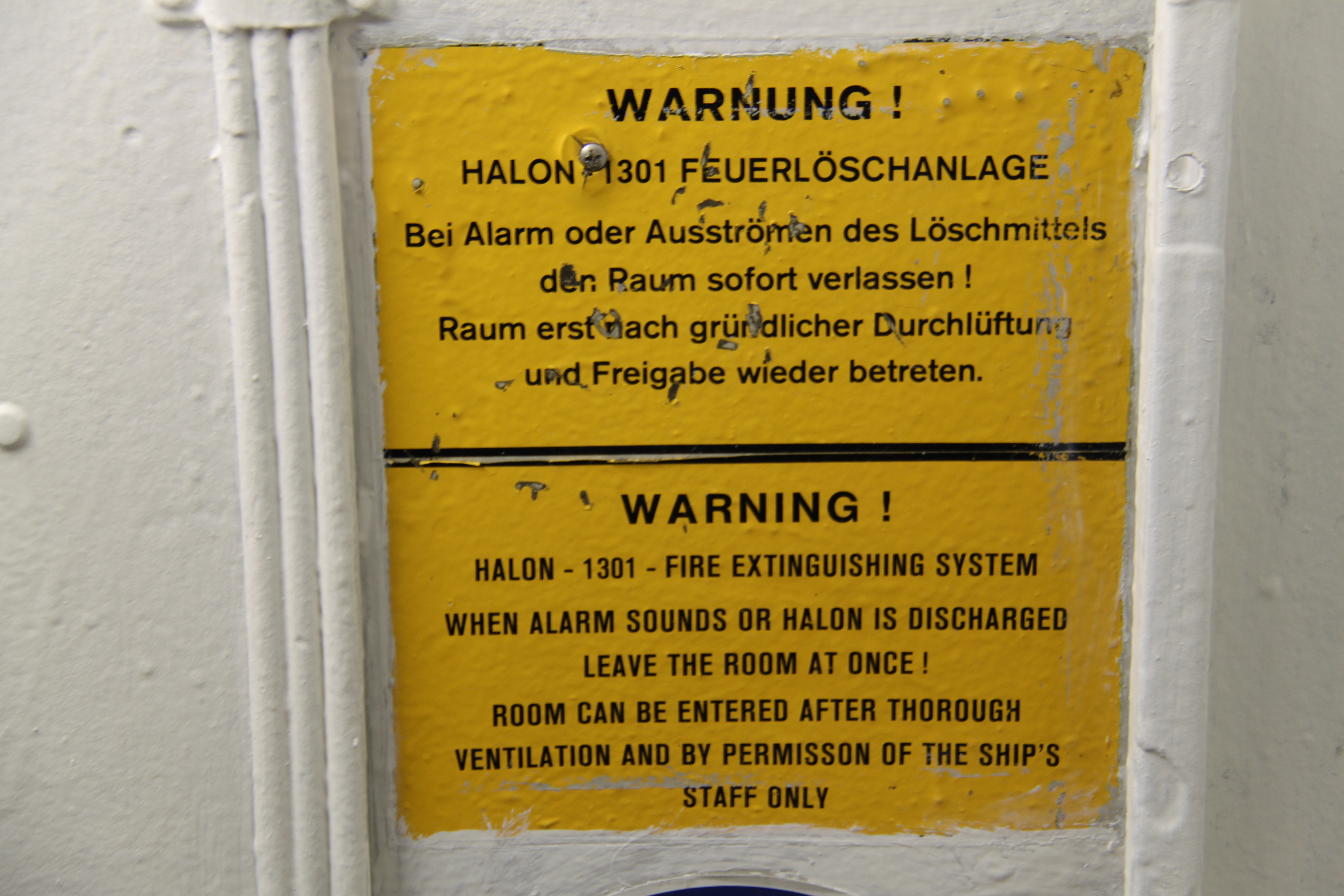 Zweisprachiger Warnhinweis auf eine Halon-Löschanlage an Bord des Zerstörer "Mölders" im Deutschen Marinemuseum Wilhelmshaven